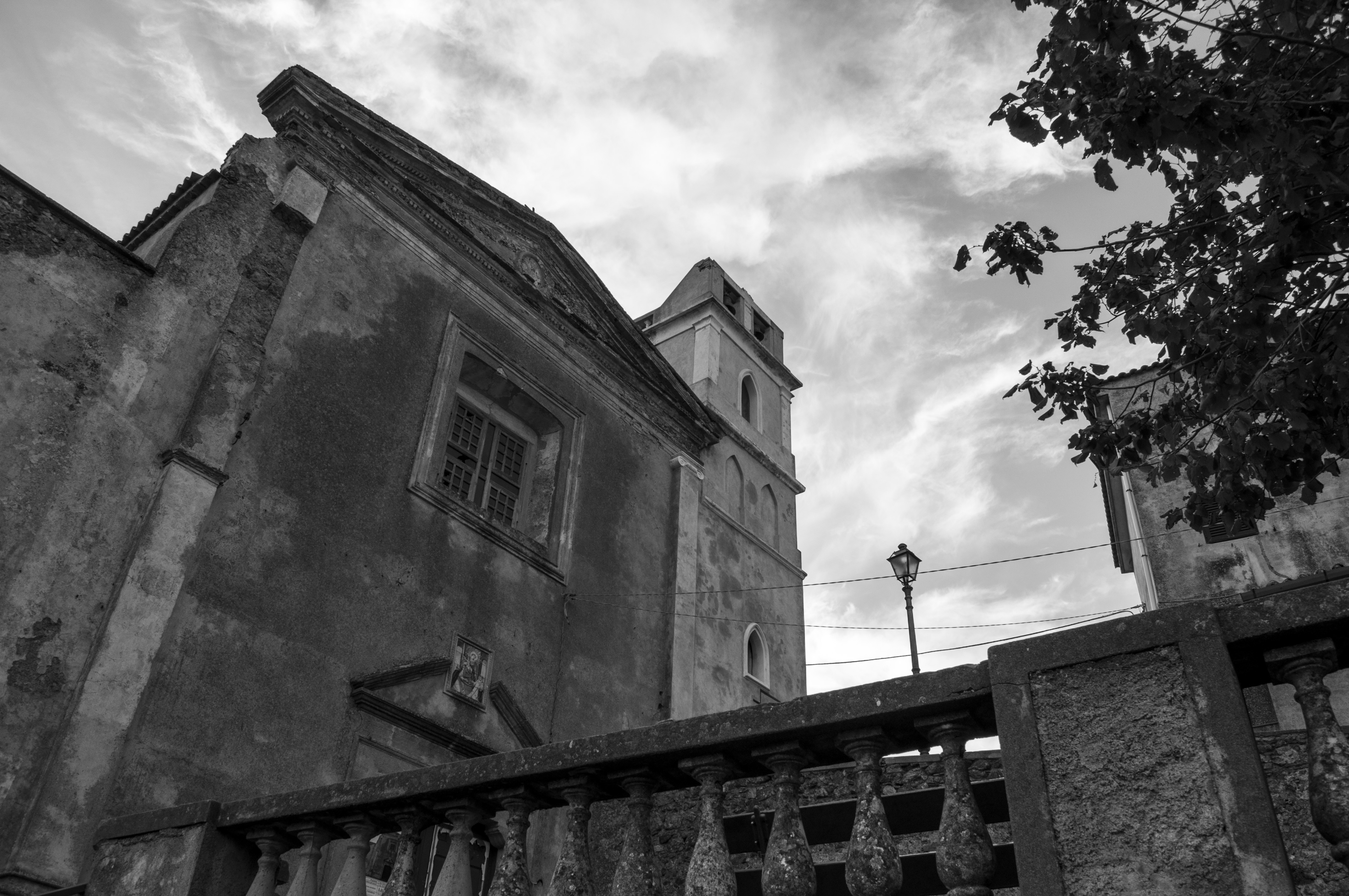 Guardia Piemontese: la chiesa del Santissimo Rosario (Chiesa Domenicana) This is a photo of a monument which is part of cultural heritage of Italy.